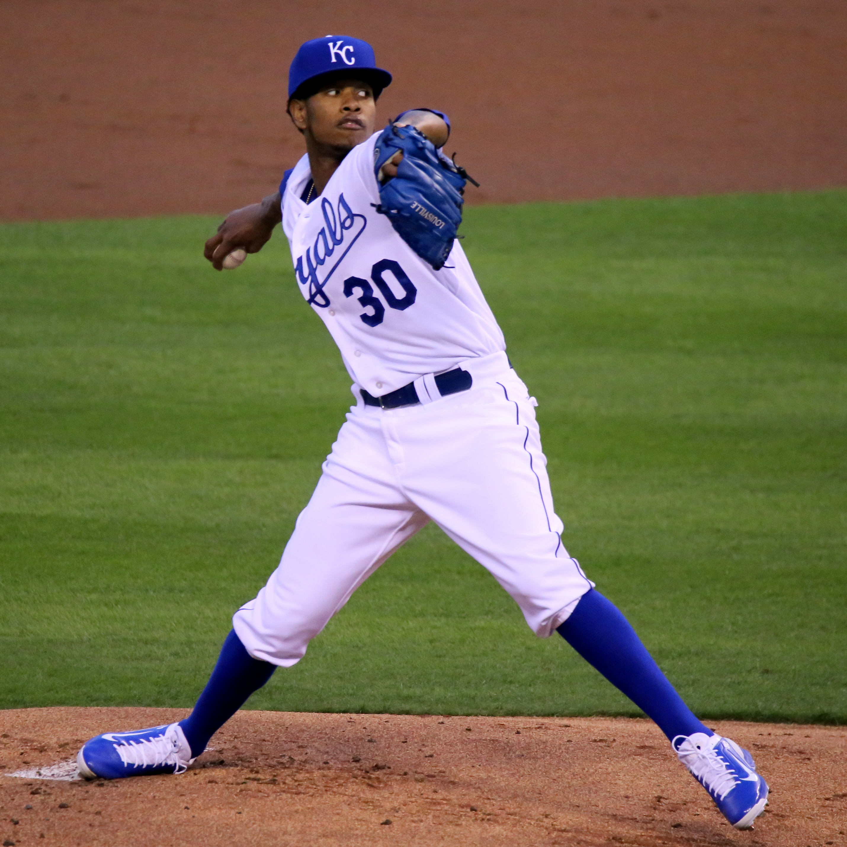 Yordano Ventura